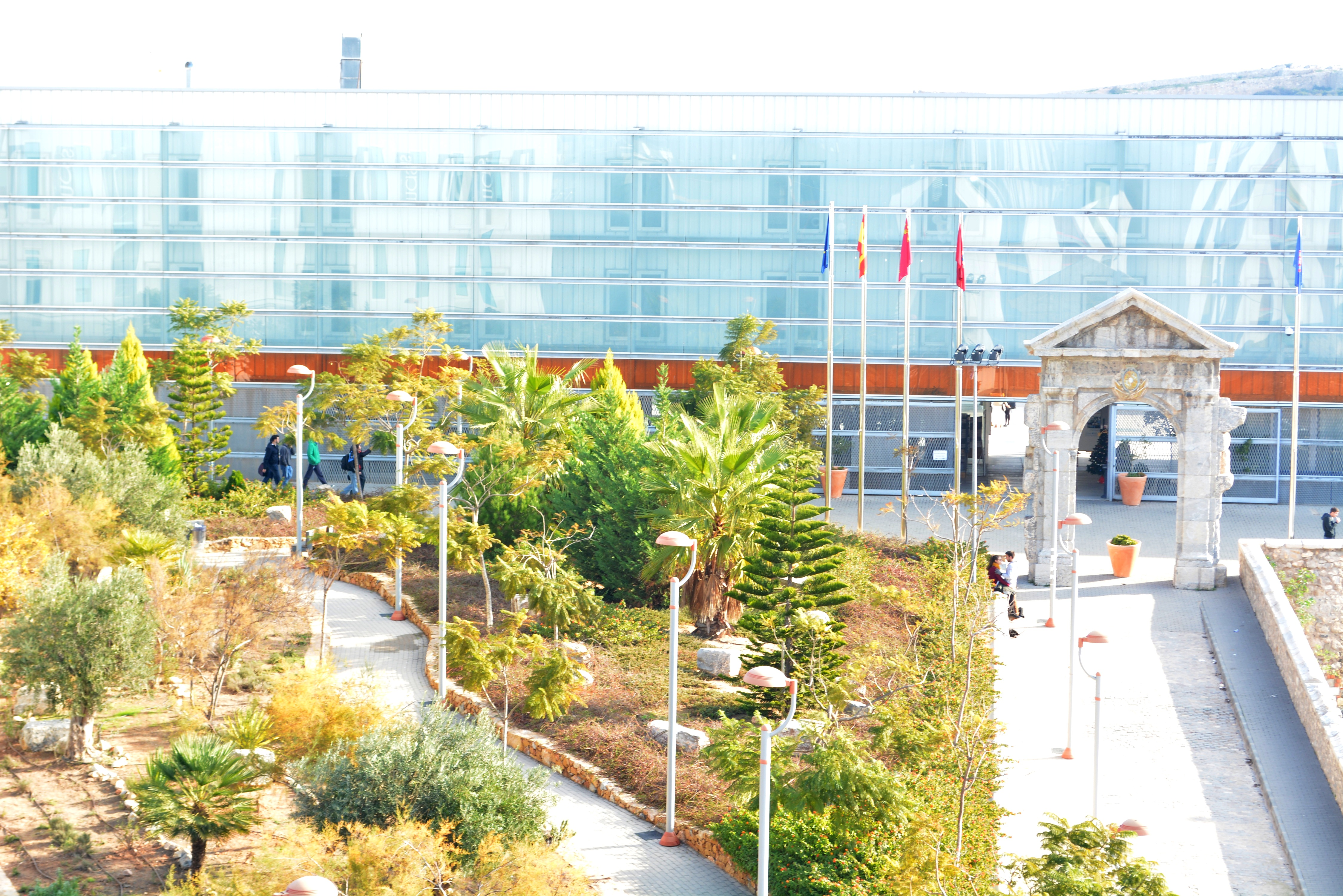 Fachada principal de la Escuela Técnica Superior de Ingeniería de Telecomunicación (ETSIT) de la Universidad Politécnica de Cartagena, sita en el remodelado Cuartel de Antigones, del siglo XVIII, y ubicada, junto a la Escuela de Industriales y los edificios de laboratorios I+D+i y ELDI en el Campus Muralla del Mar.